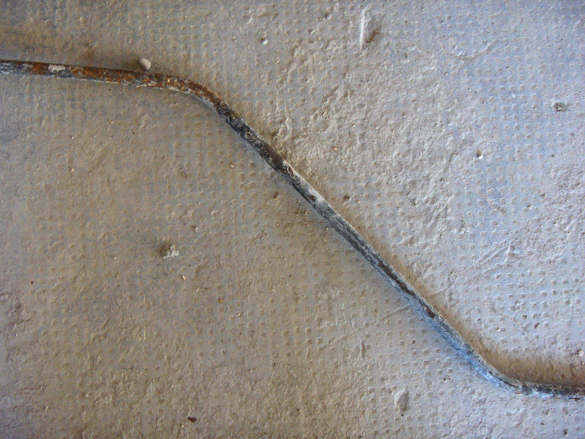 Vecchia barra d'acciaio utilizzata un tempo in travi in cemento armato